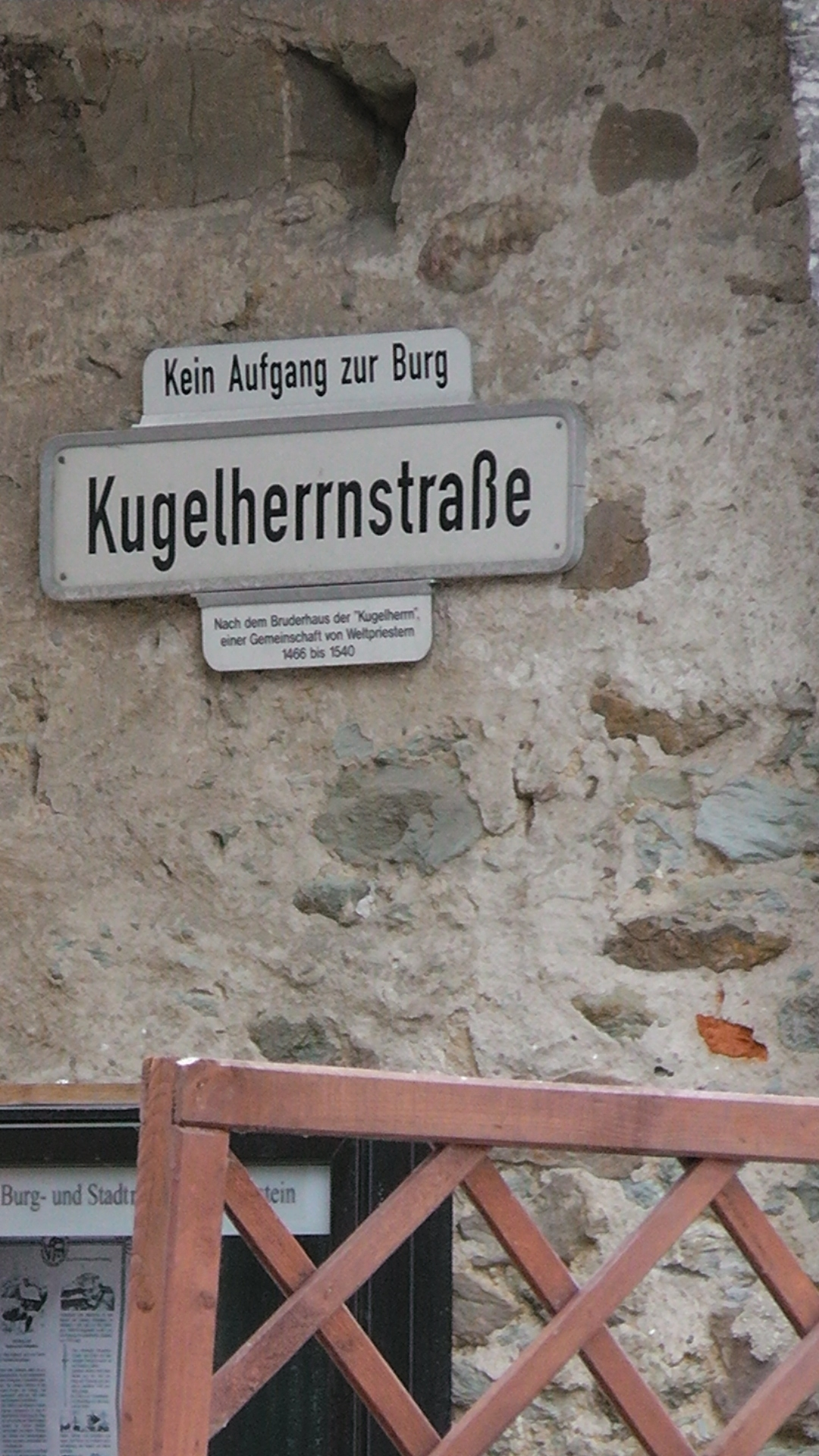 Strassenschild für die Kugelherrnstrasse in Königstein im Taunus, nach den Weltpriestern benannt